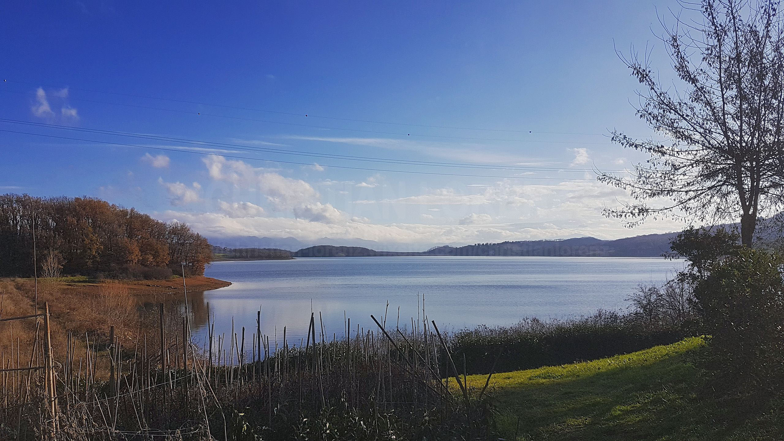 Lago di Bilancino visto da Cavallina, Barberino di Mugello.